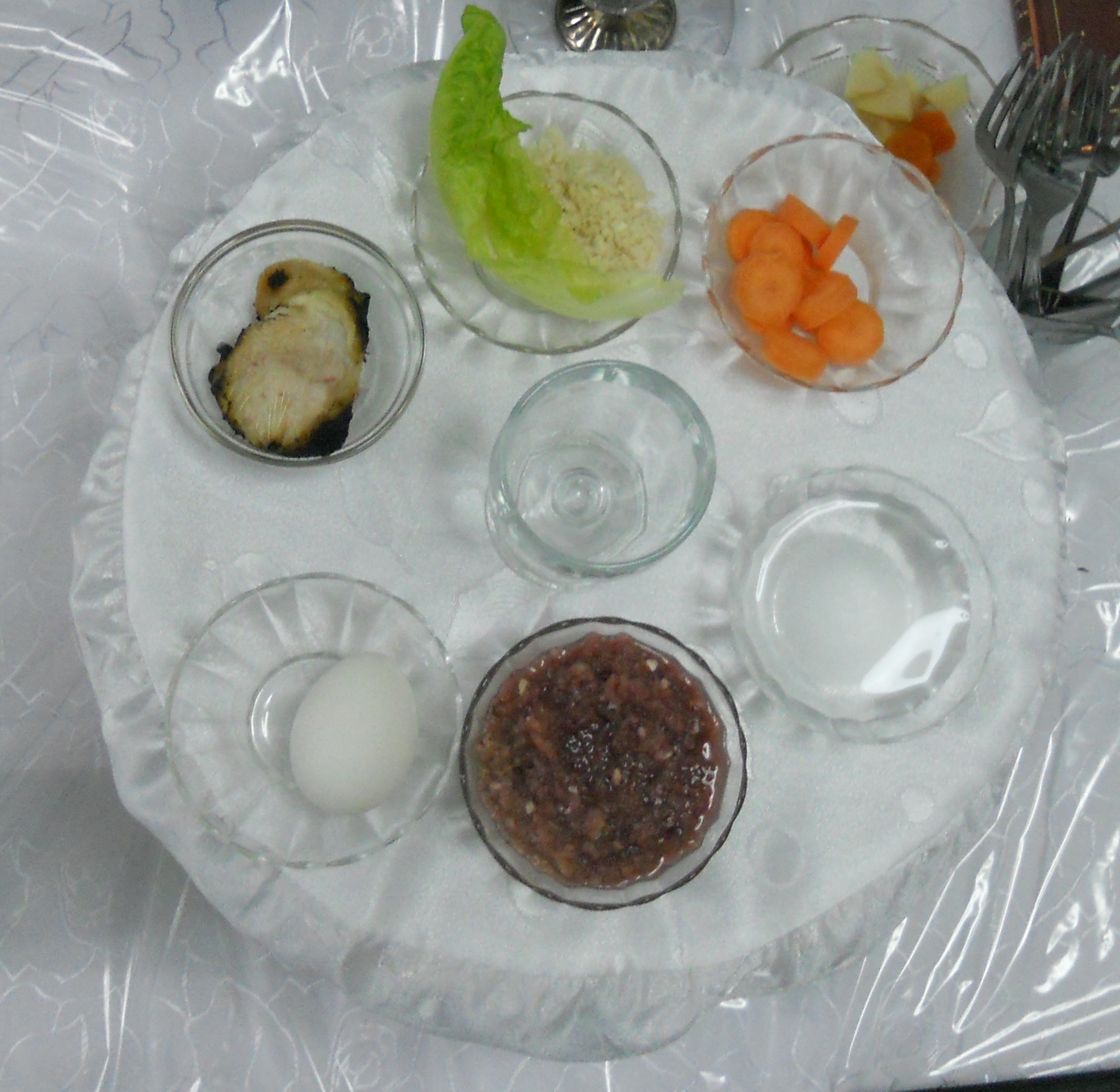 קערת הסדר מרור חרוסת מי מלח ביצה כרפס וזרוע במרכז כוס של אליהו הניא